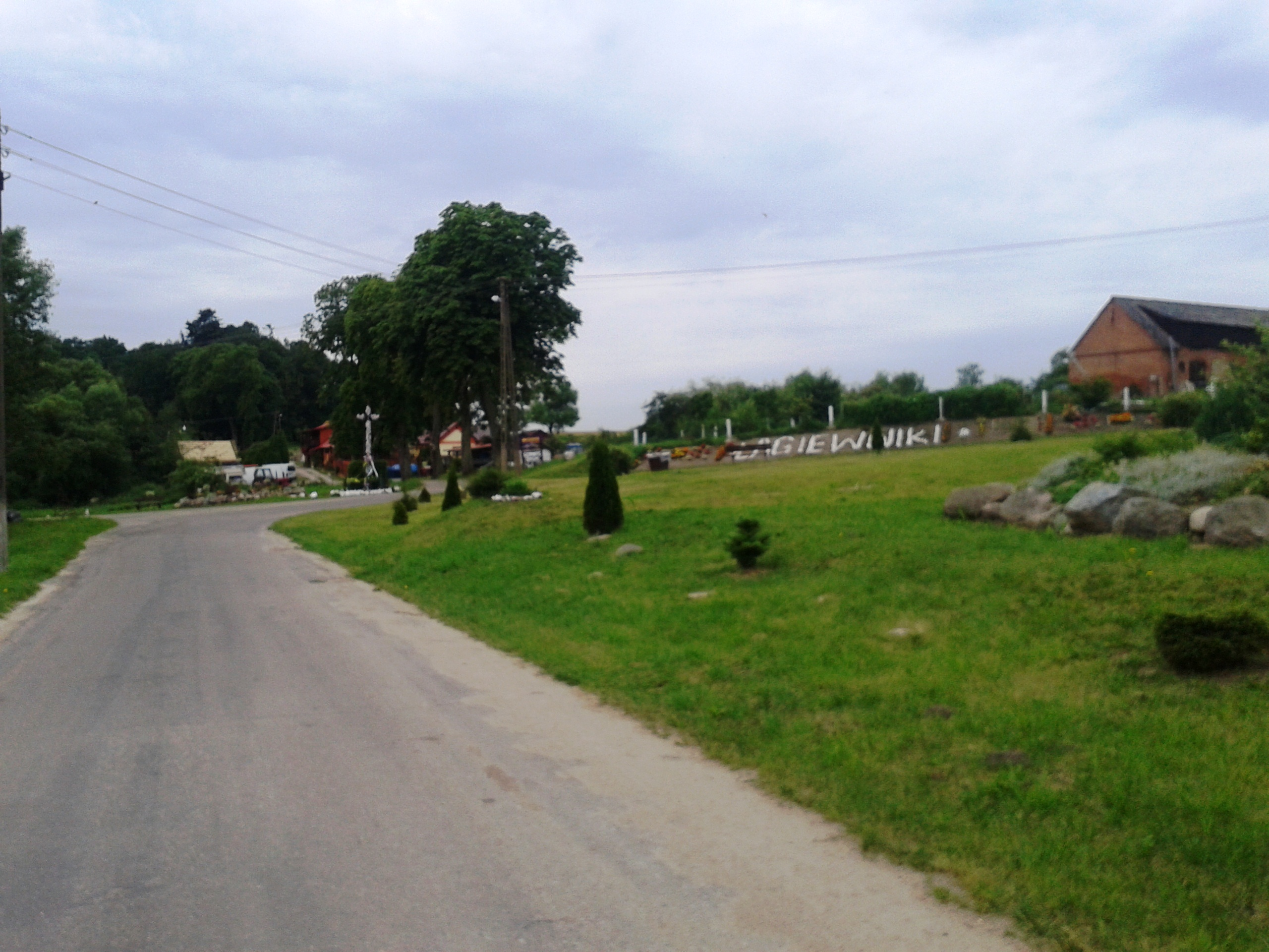 Łagiewniki - gmina Resko